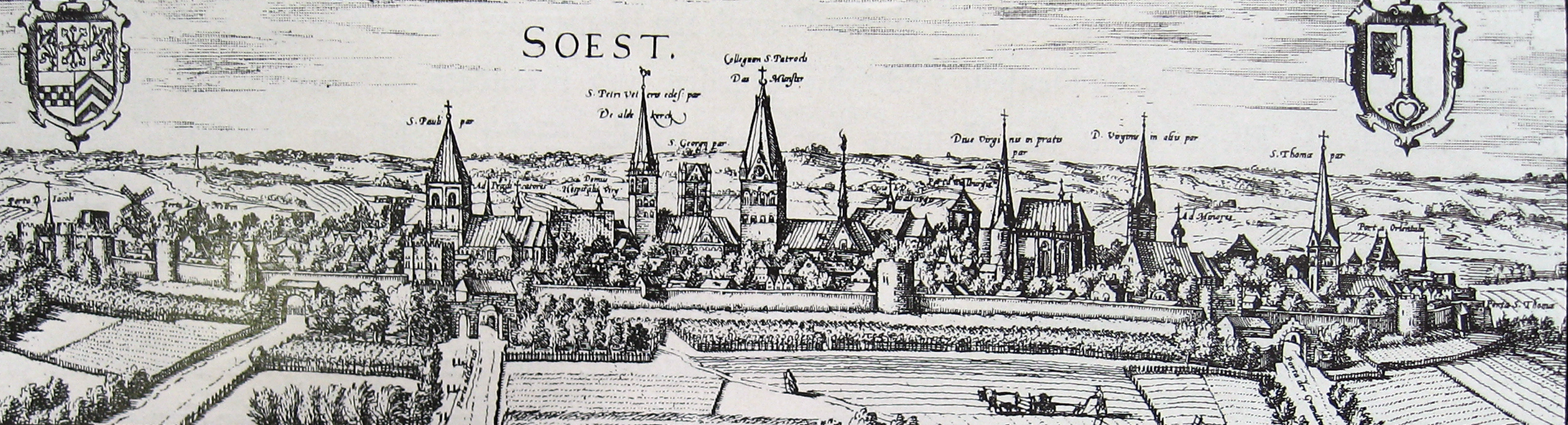 Soest, Merian, Stadtansicht